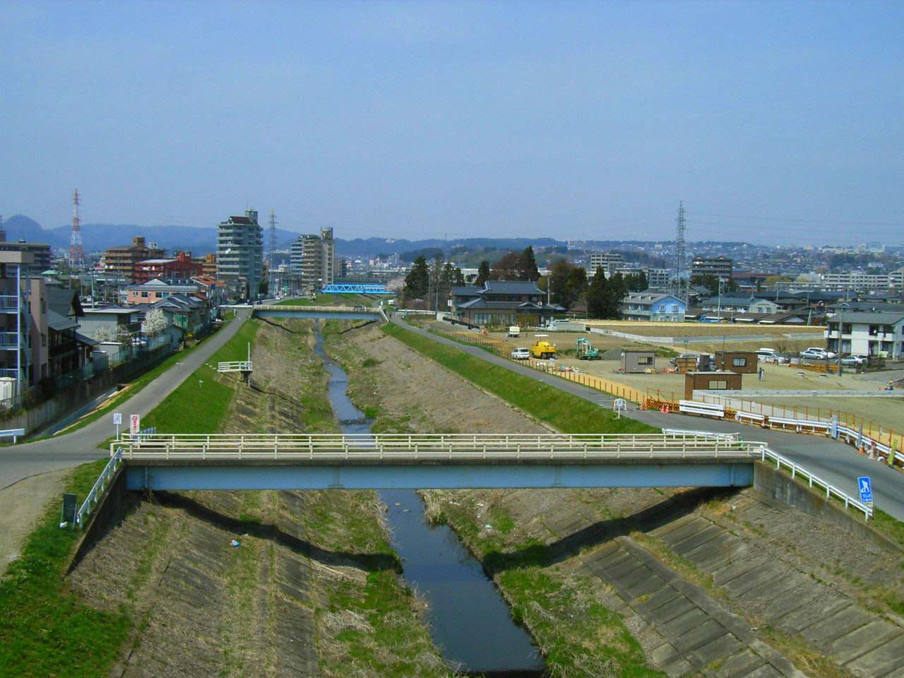 Zaru River. Sendai, Miyagi prefecture, Japan.